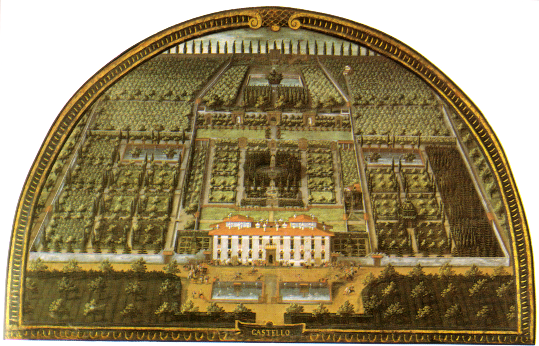 Lunette